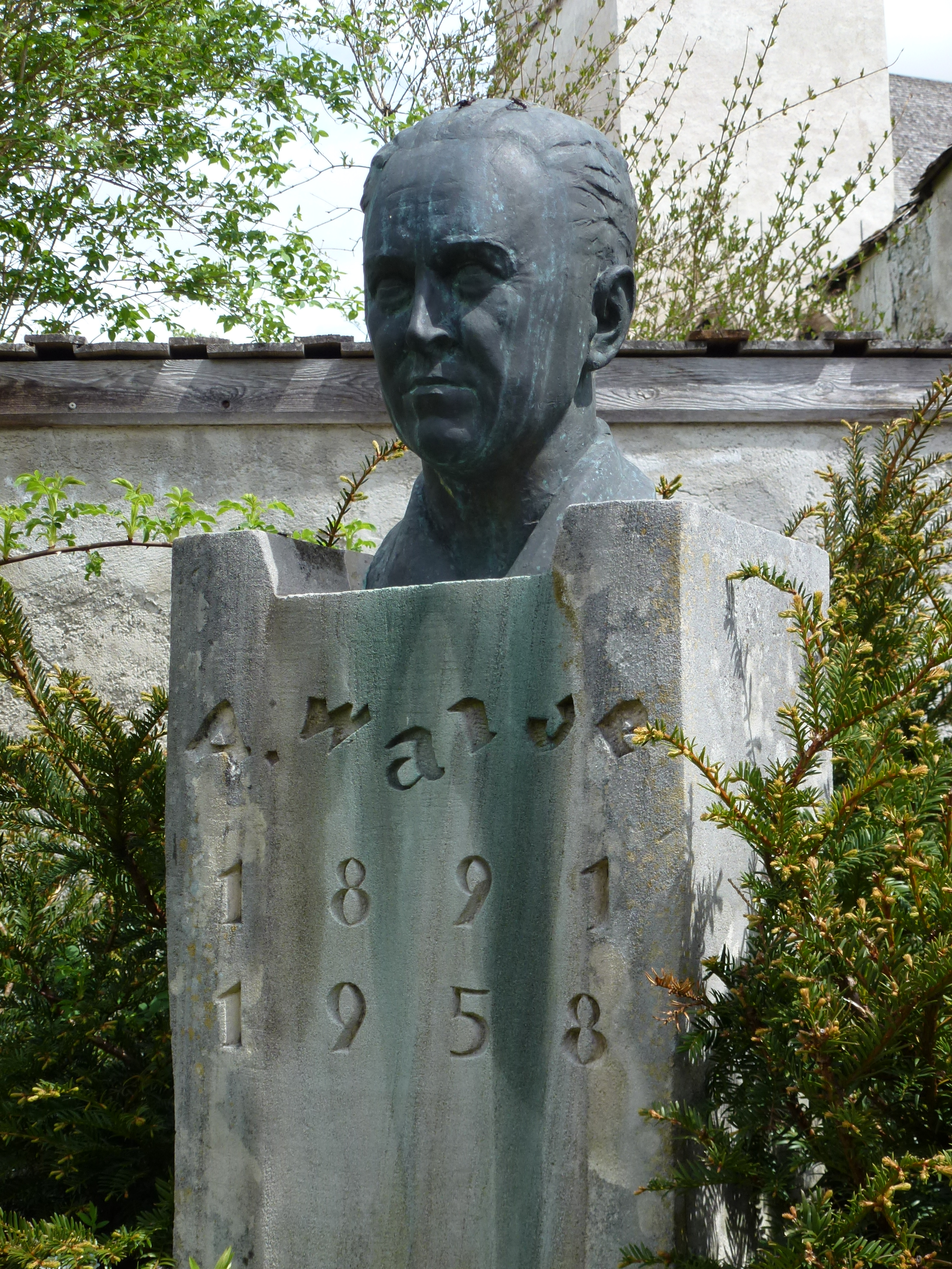 Alfons Walde-Gedenkstätte - Pfarrau, Kitzbühel This media shows the remarkable cultural object in the Austrian state of Tyrol listed by the Tyrolean Art Cadastre with the ID 10466. (on tirisMaps, pdf, more images on Commons)